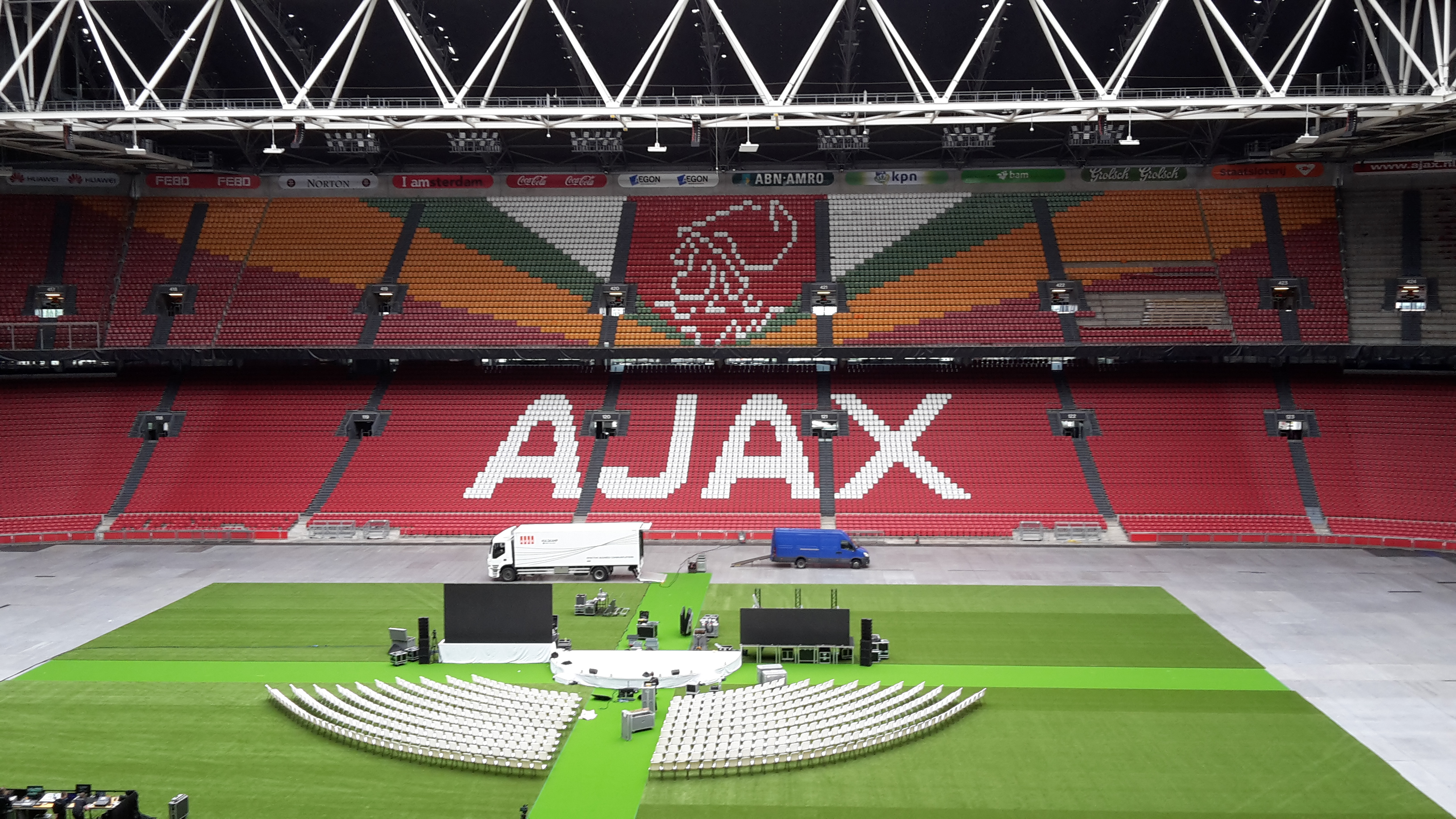 Johan Cruijff Arena